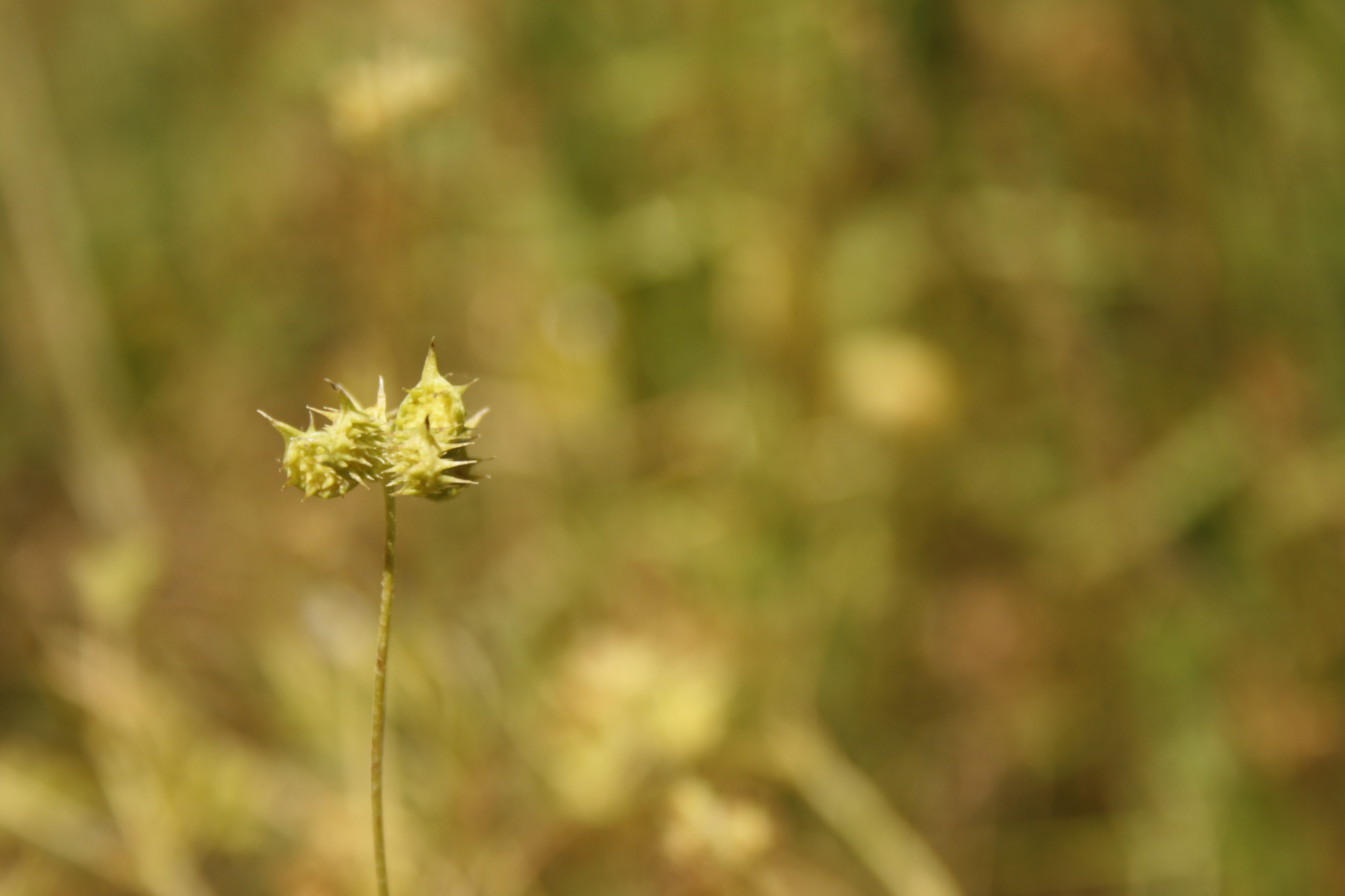 Graines de Ranunculus arvensis - Indre-et-Loire